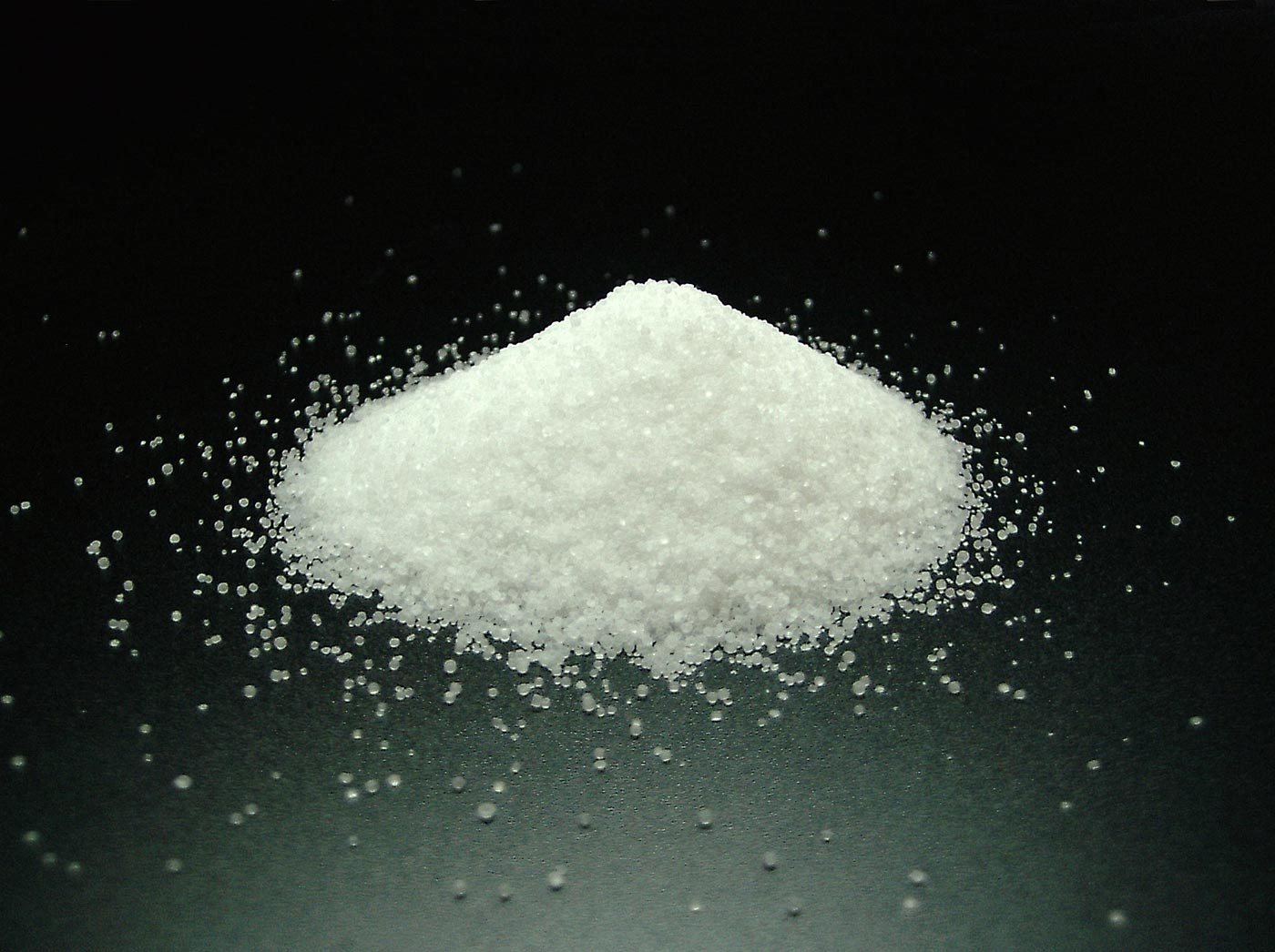 Speisesalz